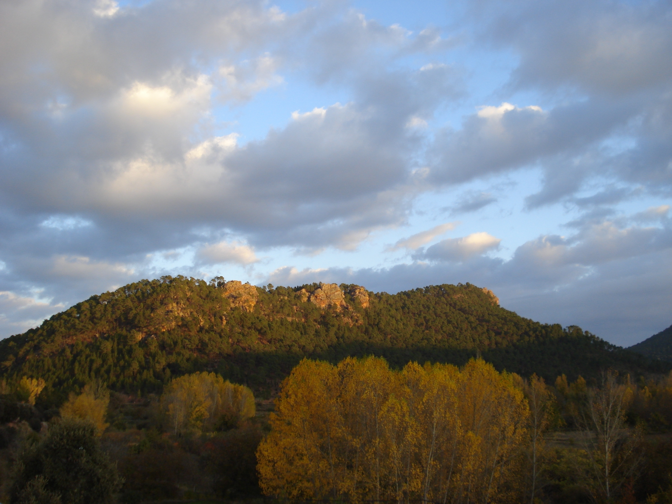 TORTEJON Y PEÑA DE LOS RAMOS, BONICHES.